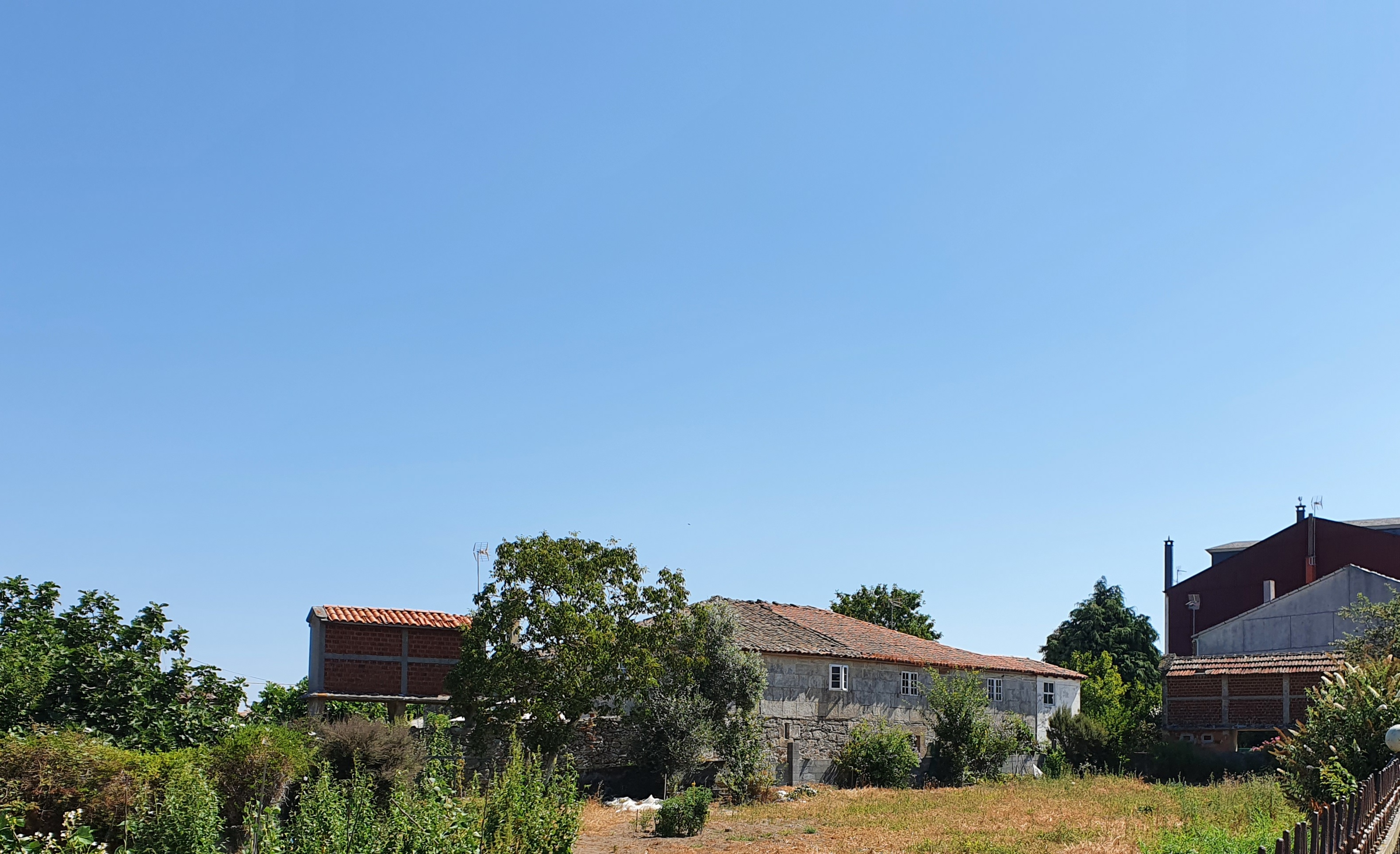 Zona da vila de Antas de Ulla, coñecida co nome de Sucasas, que na actualidade está totalmente integrada no casco urbán. O acceso natural inicial era pola estrada de Santa Mariña. A imaxe está tomada desde a Avenida de Pontevedra.